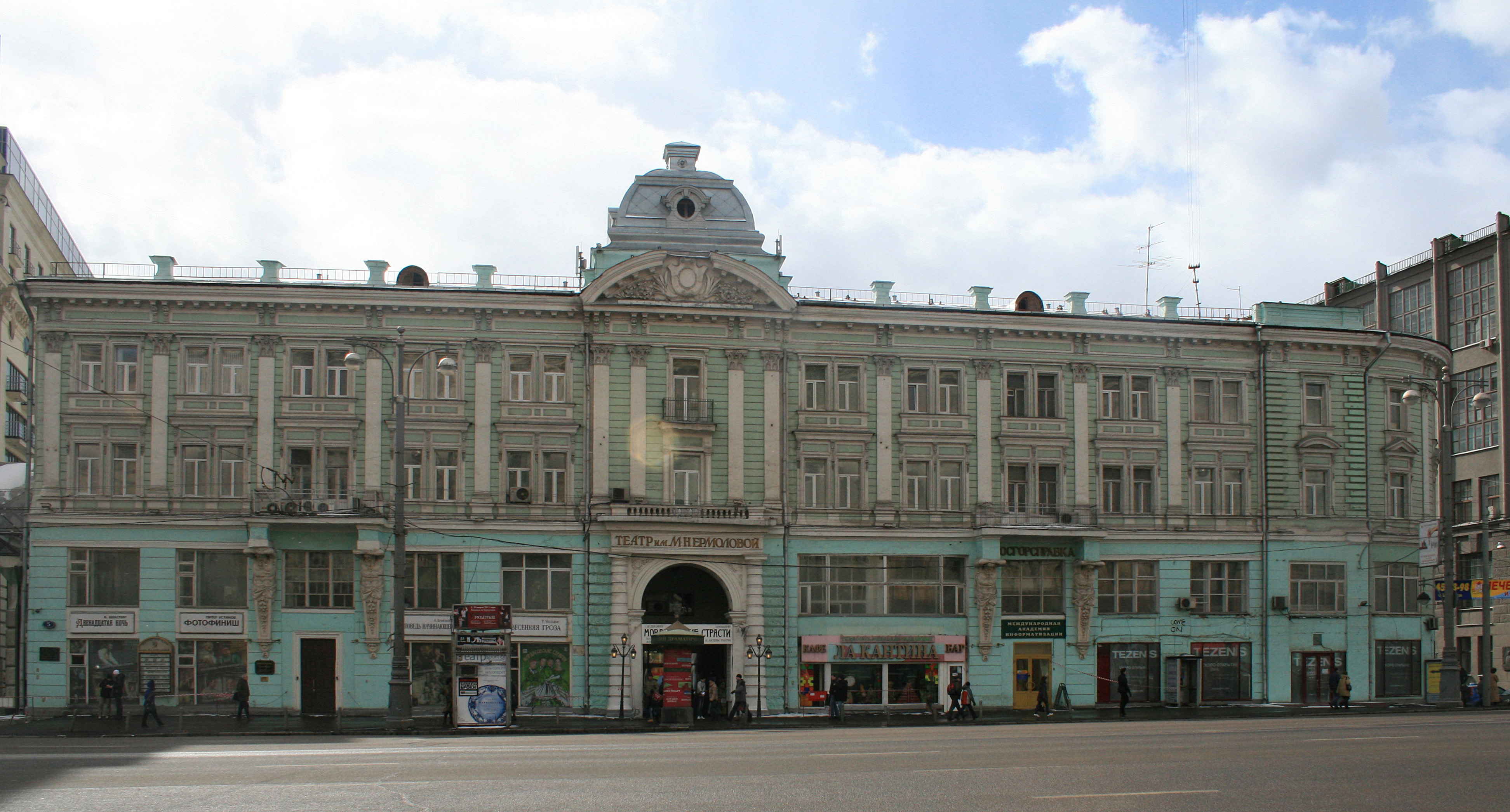 Дом М. Т. Гонцова (1835), затем «Постниковский пассаж», ныне театр им. М. Н. Ермоловой.